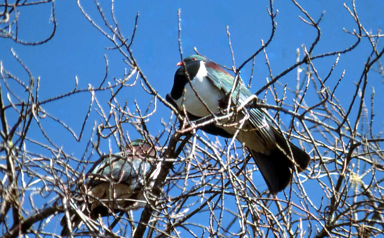 Kereru pigeons, Hemiphaga novaeseelandiae